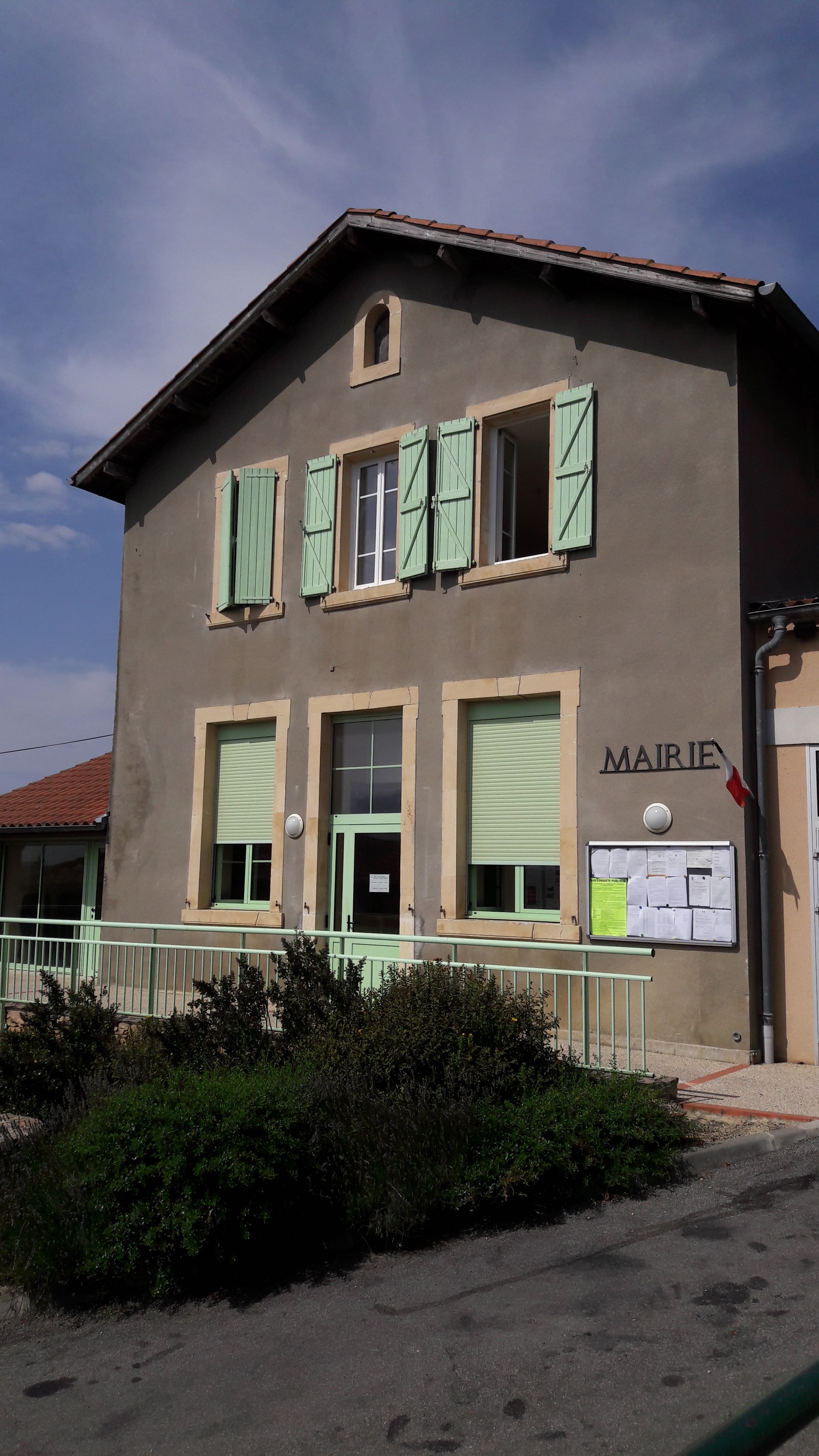 Mairie de Peyrouzet